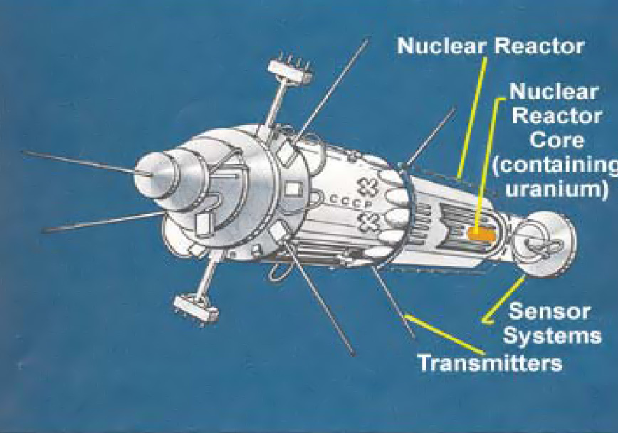 Cosmos-954 satellite artist rendition